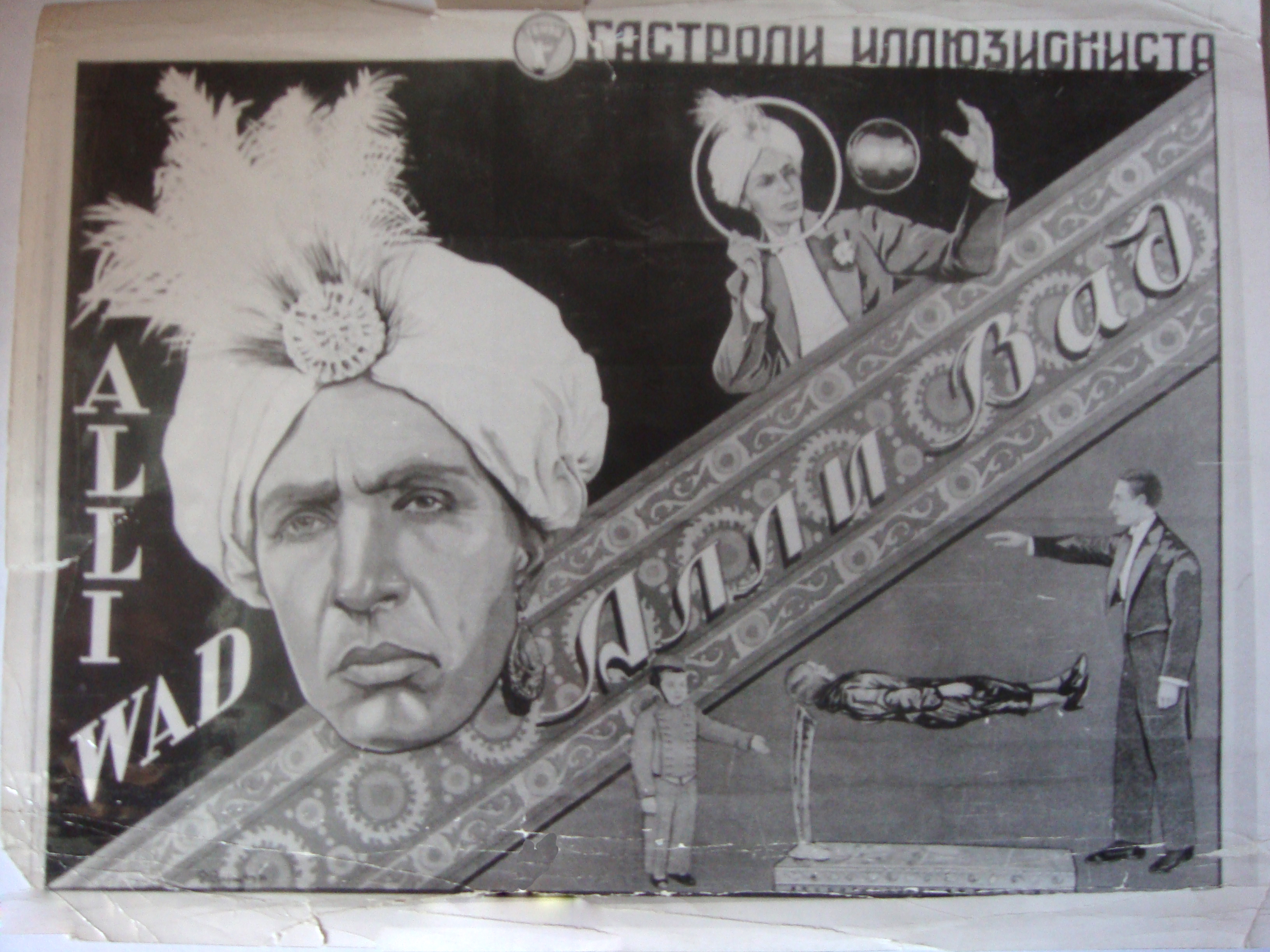 Афиша одного из номеров Вадимова-Маркелова